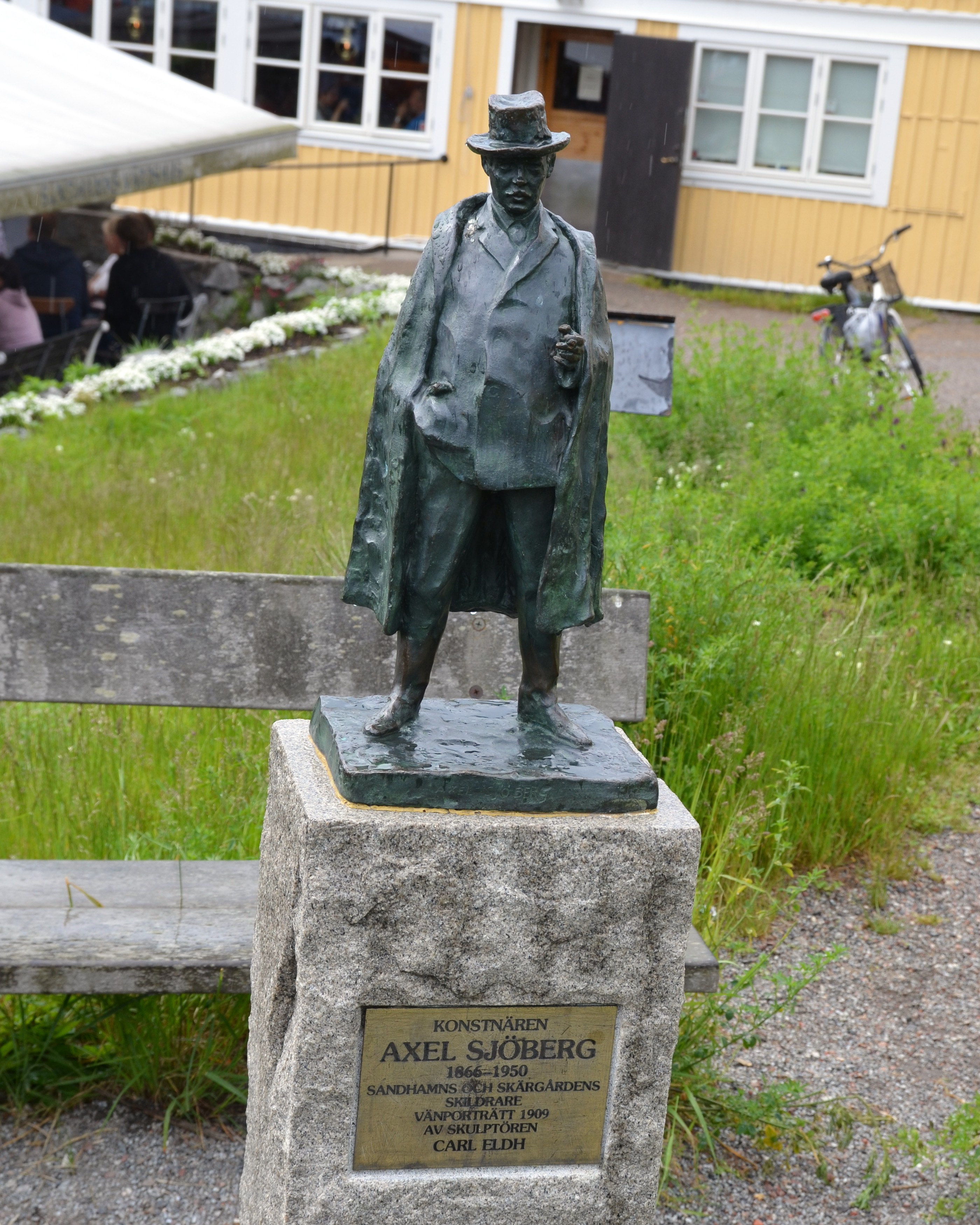 En skulptur i brons föreställande Axel Sjöberg, skapad av Carl Eldh.